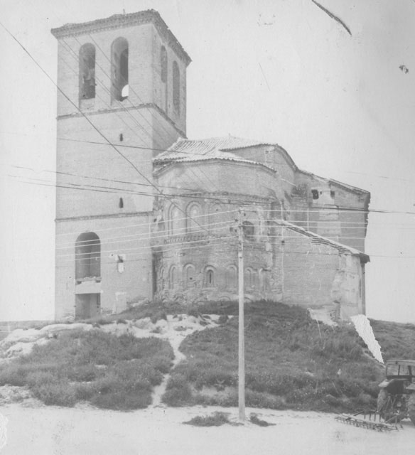 Iglesia de San Matías - Bobadilla del Campo (Valladolid) - Álbum 200 x 140 - Fotografía. Papel 90 x 95 B/N